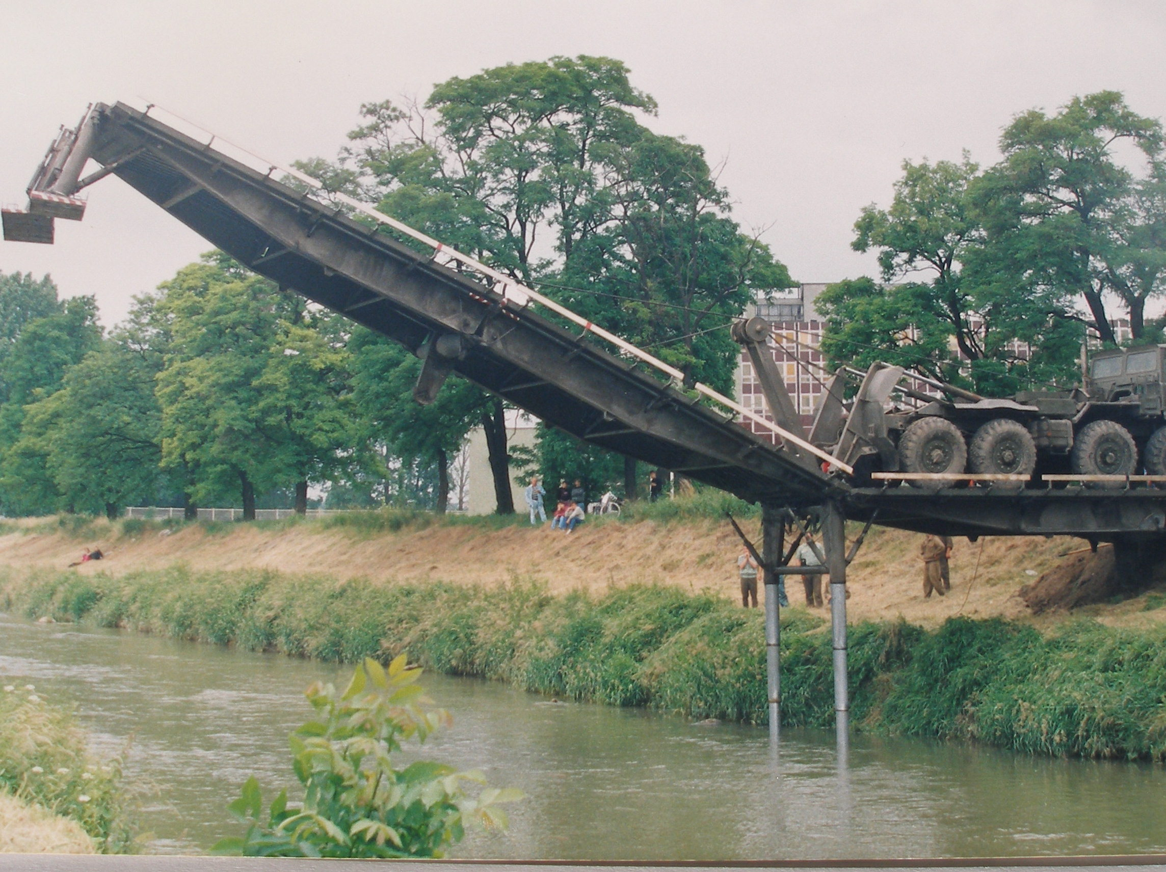 Premostenie rieky Torysy, v roku 1995 počas návštevy pápeža Jána Pavla II v Prešove pri Mestskej hale. Most postavili vojaci-ženisti, príslušníci 2. armádneho zboru.